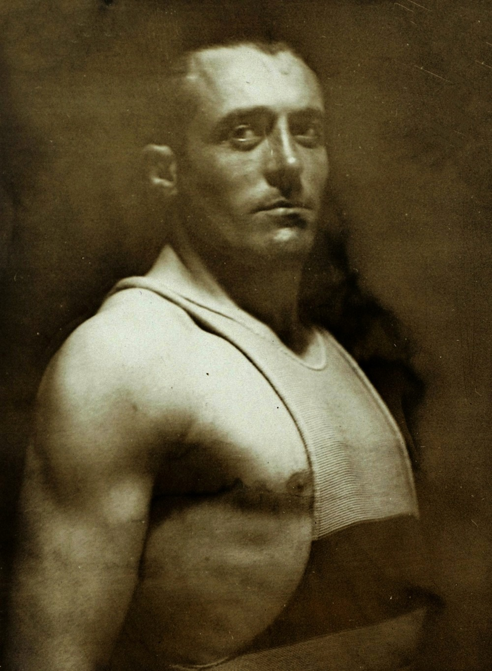 Sport. Sport, Olympische Spelen Amsterdam, 1928 : Olympisch kampioen worstelen vrije stijl tot 87 kg, de Zweed Thure Sjöstedt.